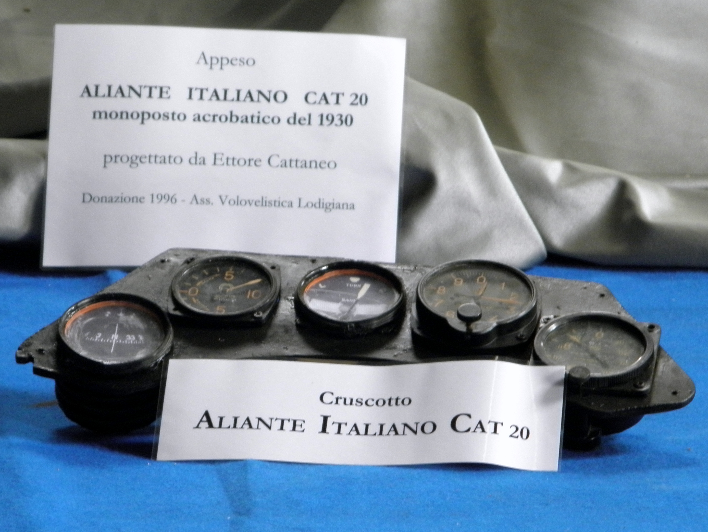 San Pelagio, frazione di Due Carrare: Museo dell'aria e dello spazio, il pannello strumenti dell'aliante acrobatico CAT 20 esposto nel museo.